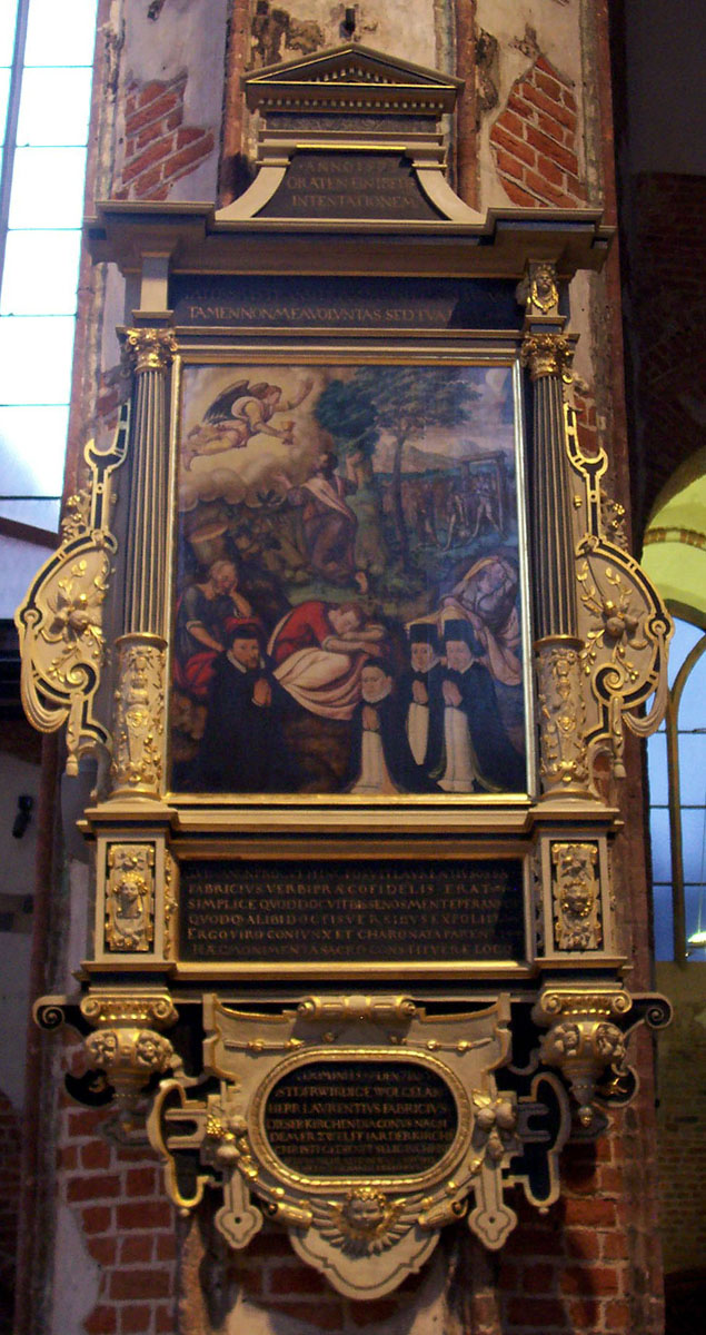 Gdańsk, Kościół św. Jana, epitafium Wawrzyńca Fabriciusa, 1579